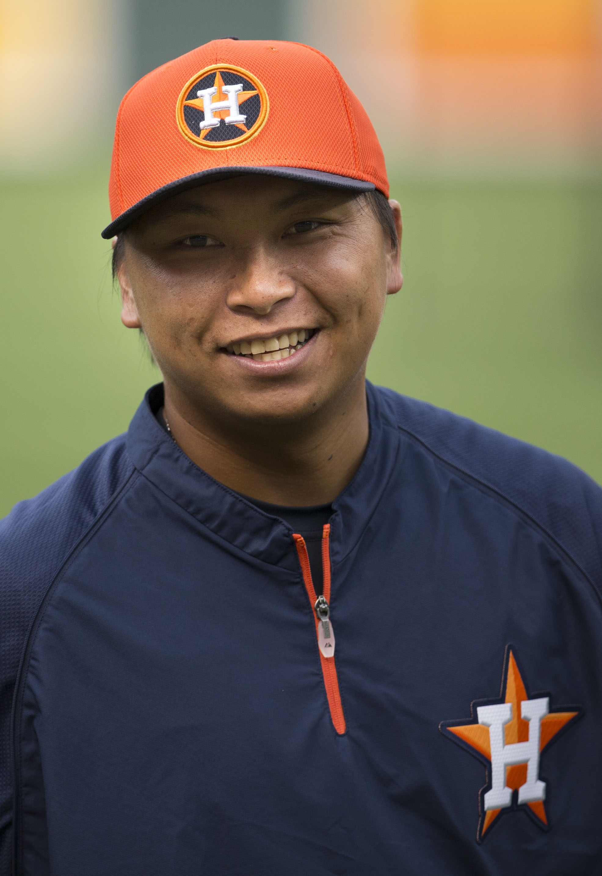 Chia-Jen Lo